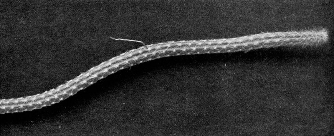 Selenicereus grandiflorus ssp. donkelaarii (Hylocereeae; Cactaceae; Planta) Nathaniel Lord Britton és Joseph Nelson Rose "The Cactaceae" c. könyvéből